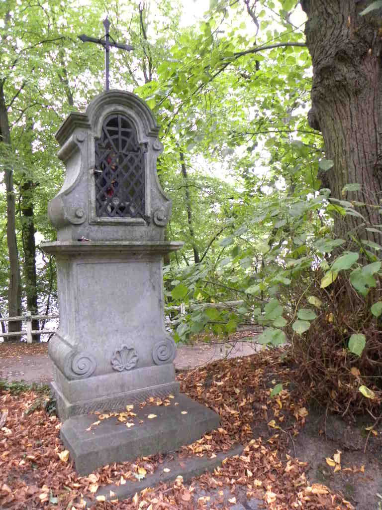 Chapelle Saint Sauveur Noirhat Bousval, le long de la drève du château de la Motte à Noirhat.